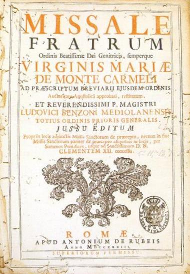 Folha de rosto de Missale Fratrum dos monges carmelitas, com vinheta e carimbo da Real Biblioteca, 1733. Divisão de Música/FBN, Rio de Janeiro, Brasil.